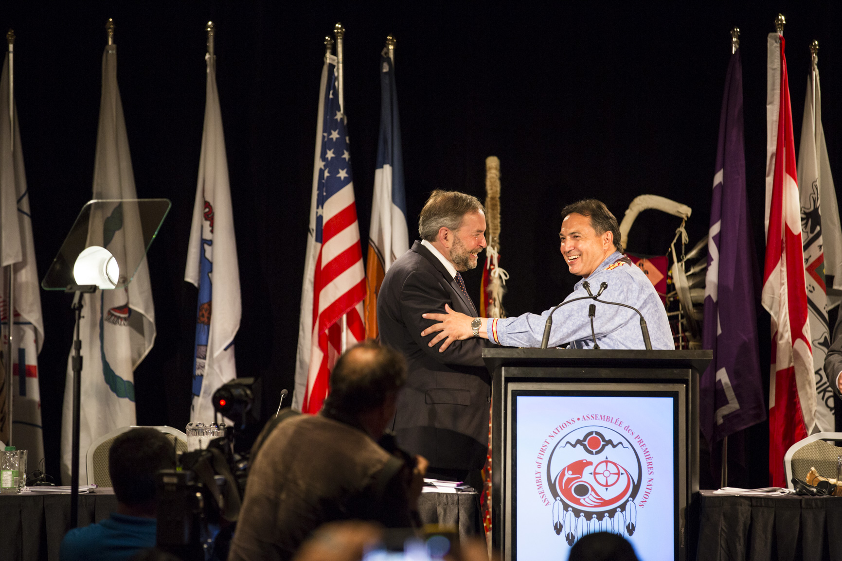 20150707-Montreal-Tom-Mulcair